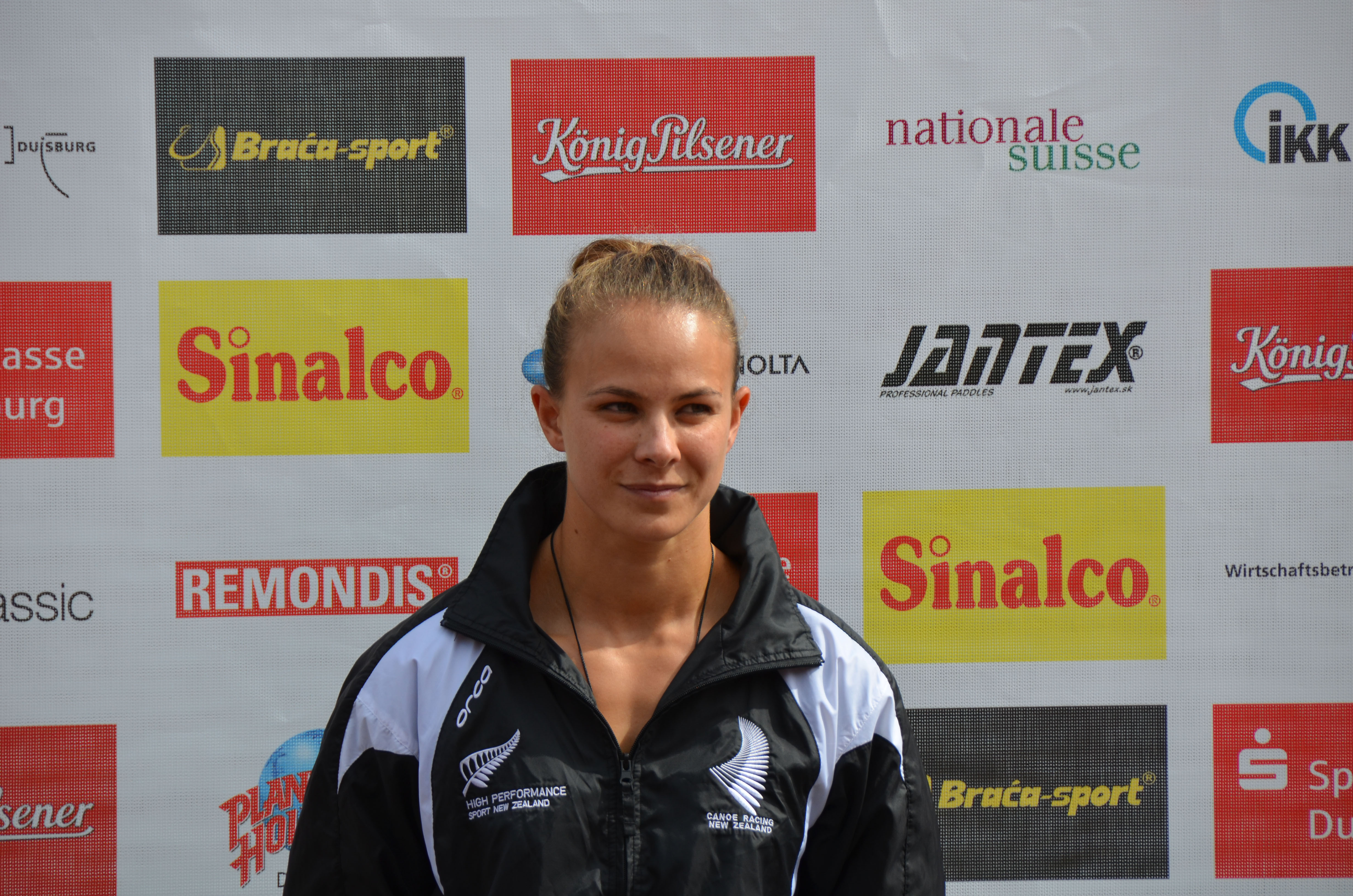 2013 ICF Canoe Sprint World Championships in Duisburg - Alle Ergebnisse/Teilnehmer unter: Gewinner:NZL - NEW ZEALAND CARRINGTON, Lisa POL - POLAND WALCZYKIEWICZ, Marta SLO - SLOVENIA PONOMARENKO JANIC, Spela